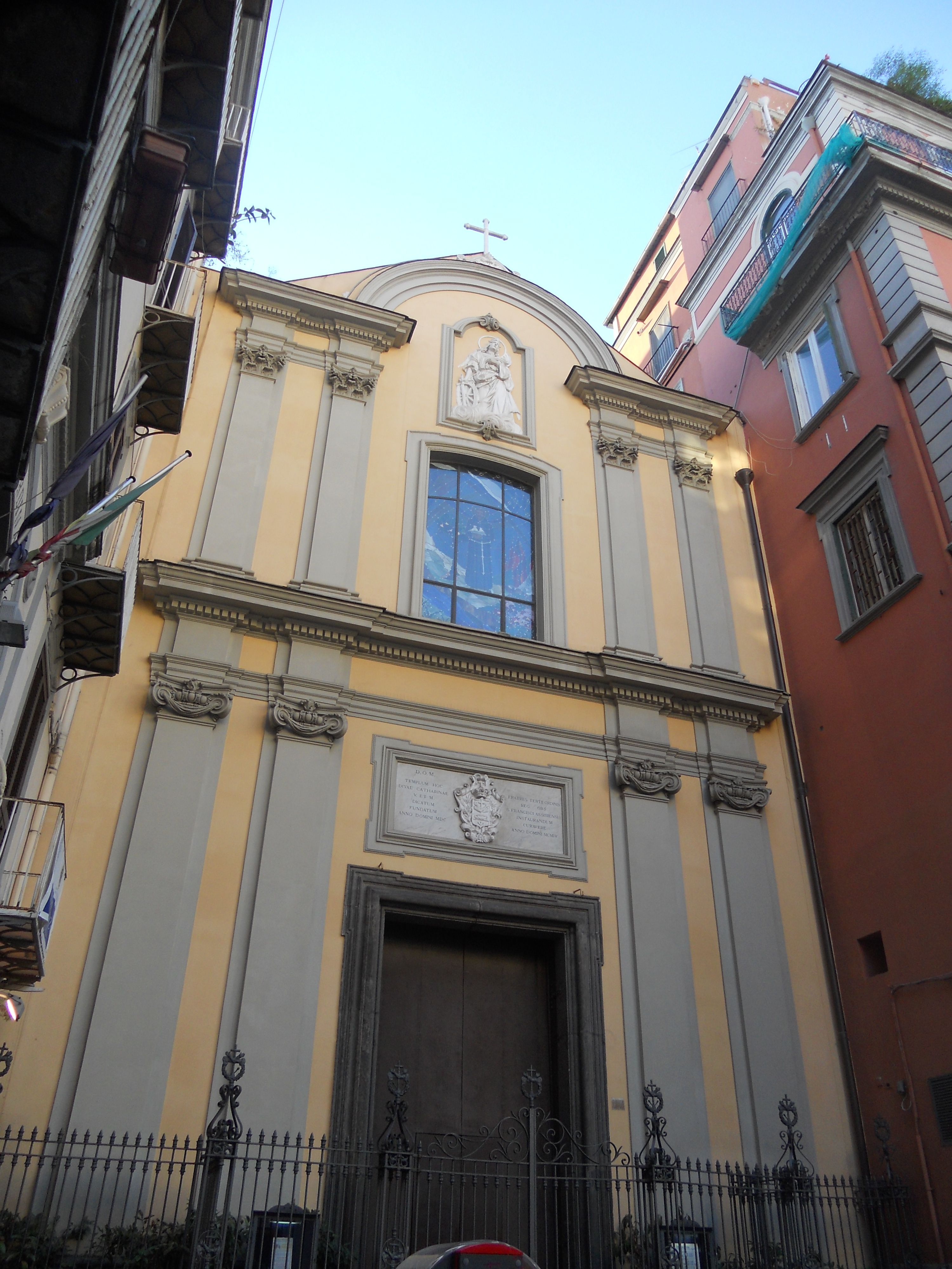 Chiesa S. Caterina a Chiaia, Napoli